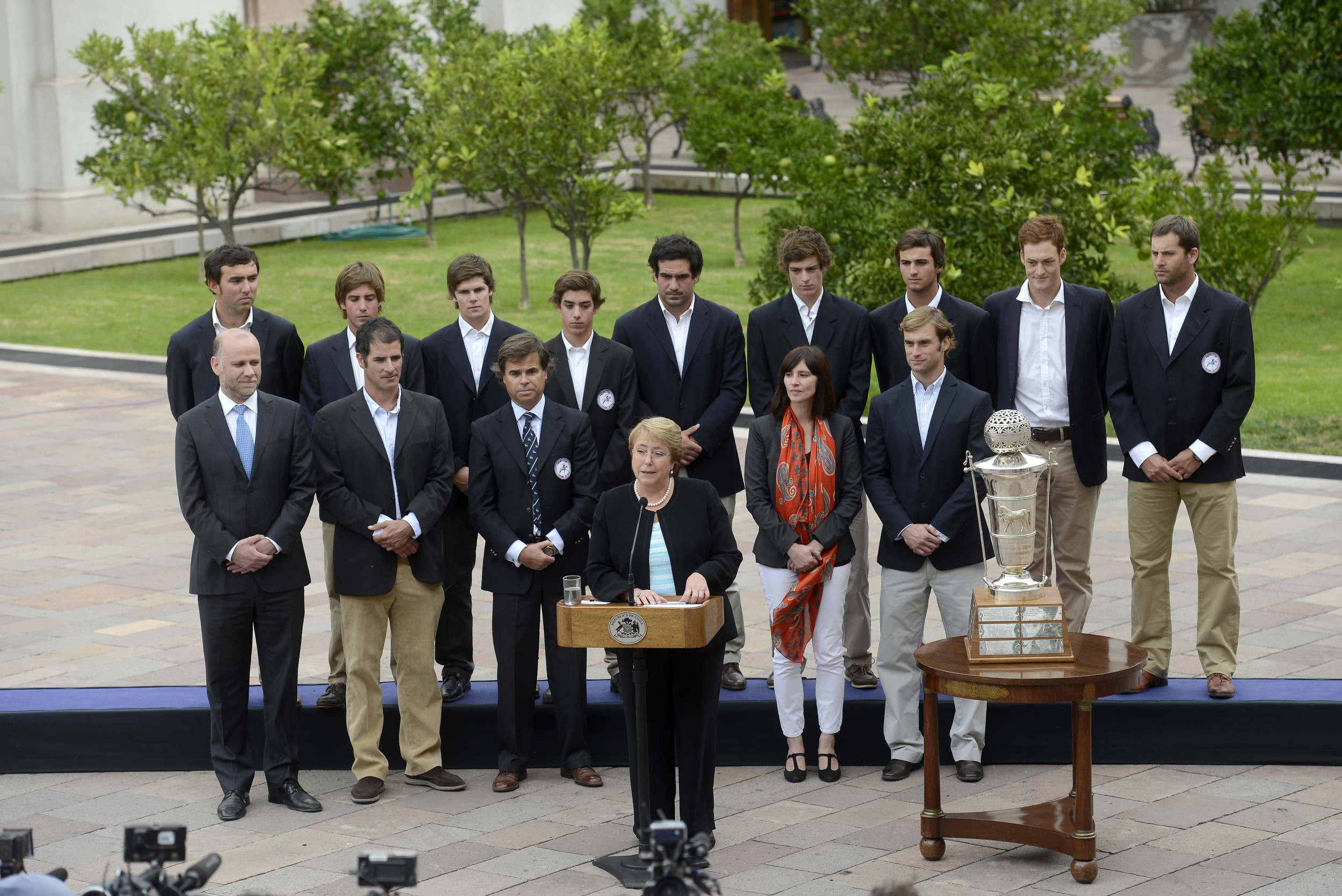 15 Abril 2015, Ministro Álvaro Elizalde junto a la Presidenta Michelle Bachelet reciben al Equipo Campeón Mundial de Polo en La Moneda.